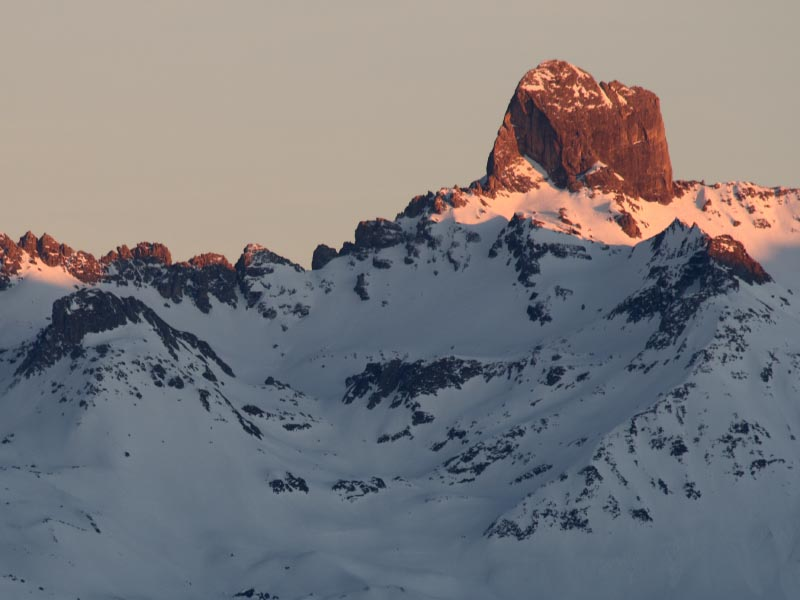 Pierra Menta, dans le Beaufortain, vue prise du village des Saisies à la tombée du jour